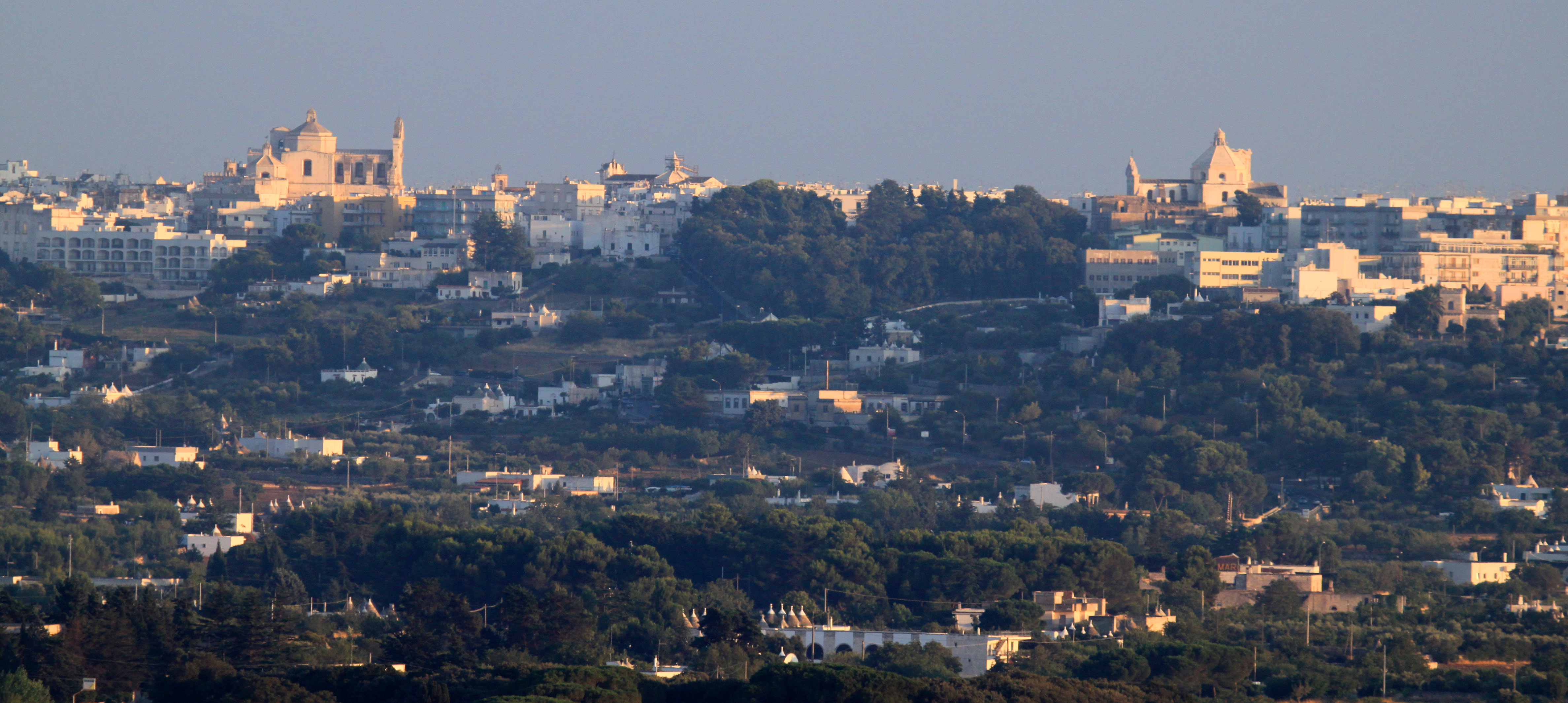 Martina Franca, vista da Locorotondo